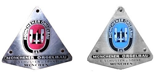 Rote und blaue Variante des Firmenschildes der Firma Münchner Orgelbau Carl Schuster & Sohn